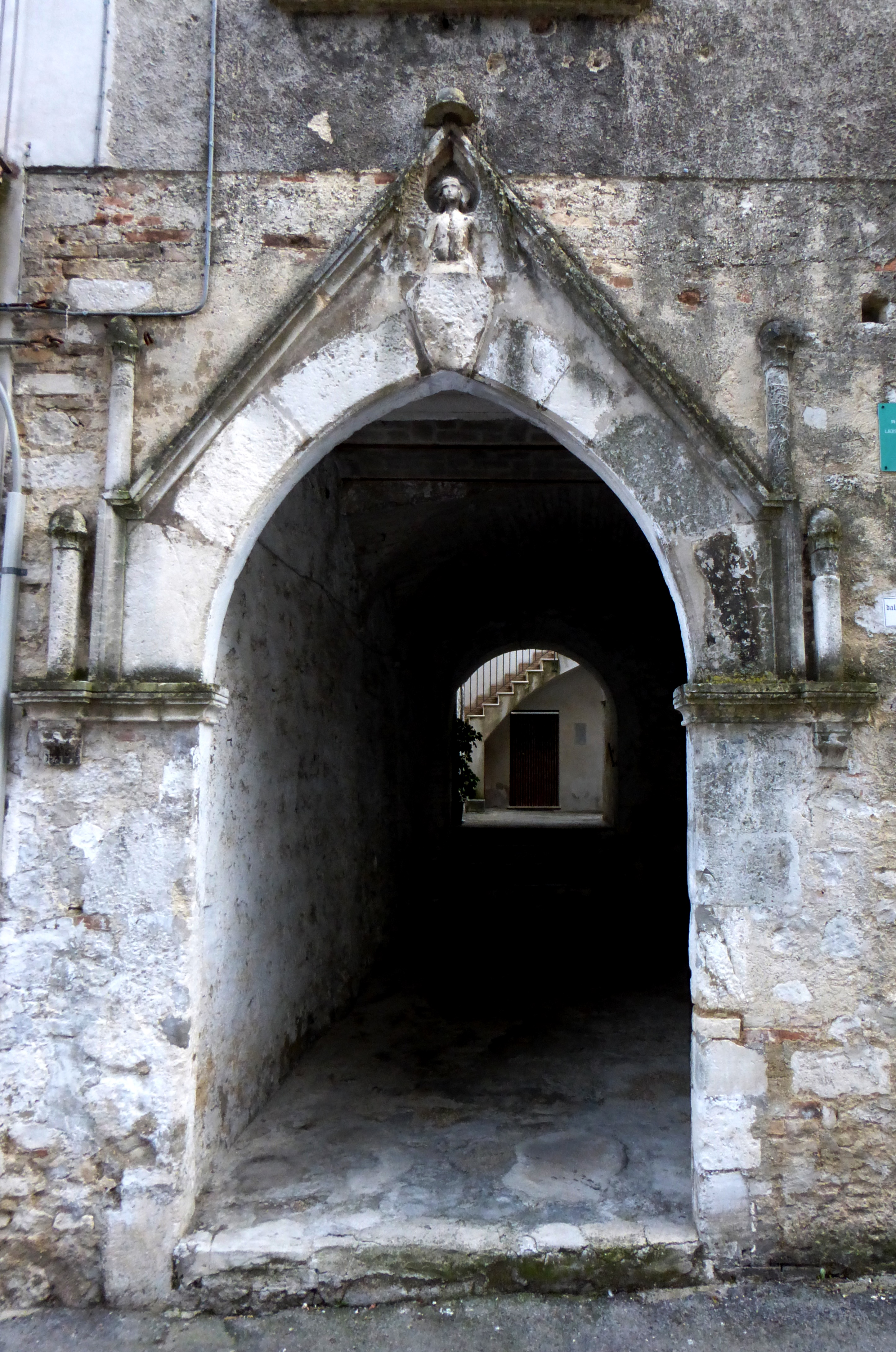 Portale di casa Marini, Guardiagrele, Chieti.